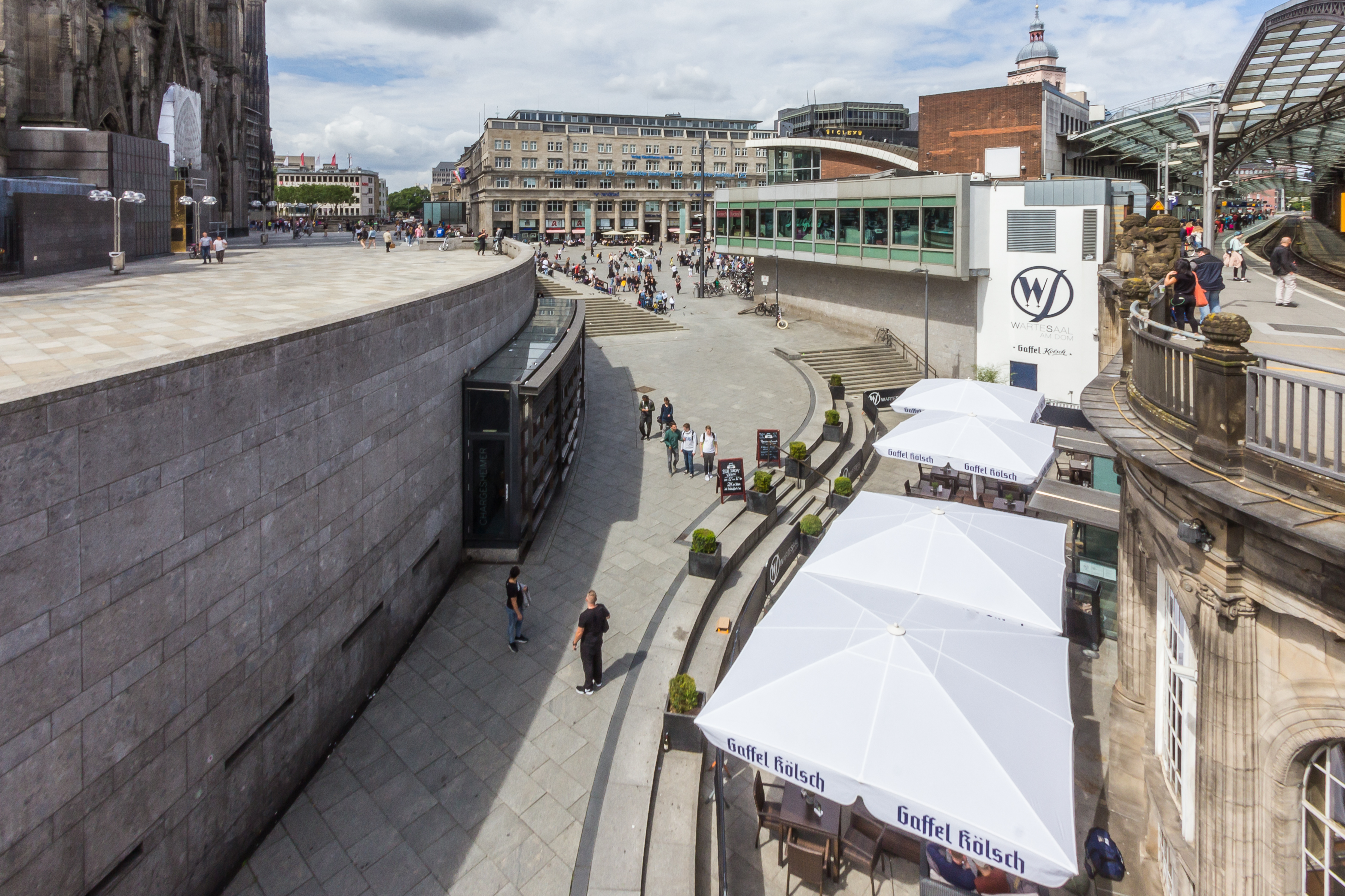 Chargesheimerplatz Köln. Rechts der Alte Wartesaal